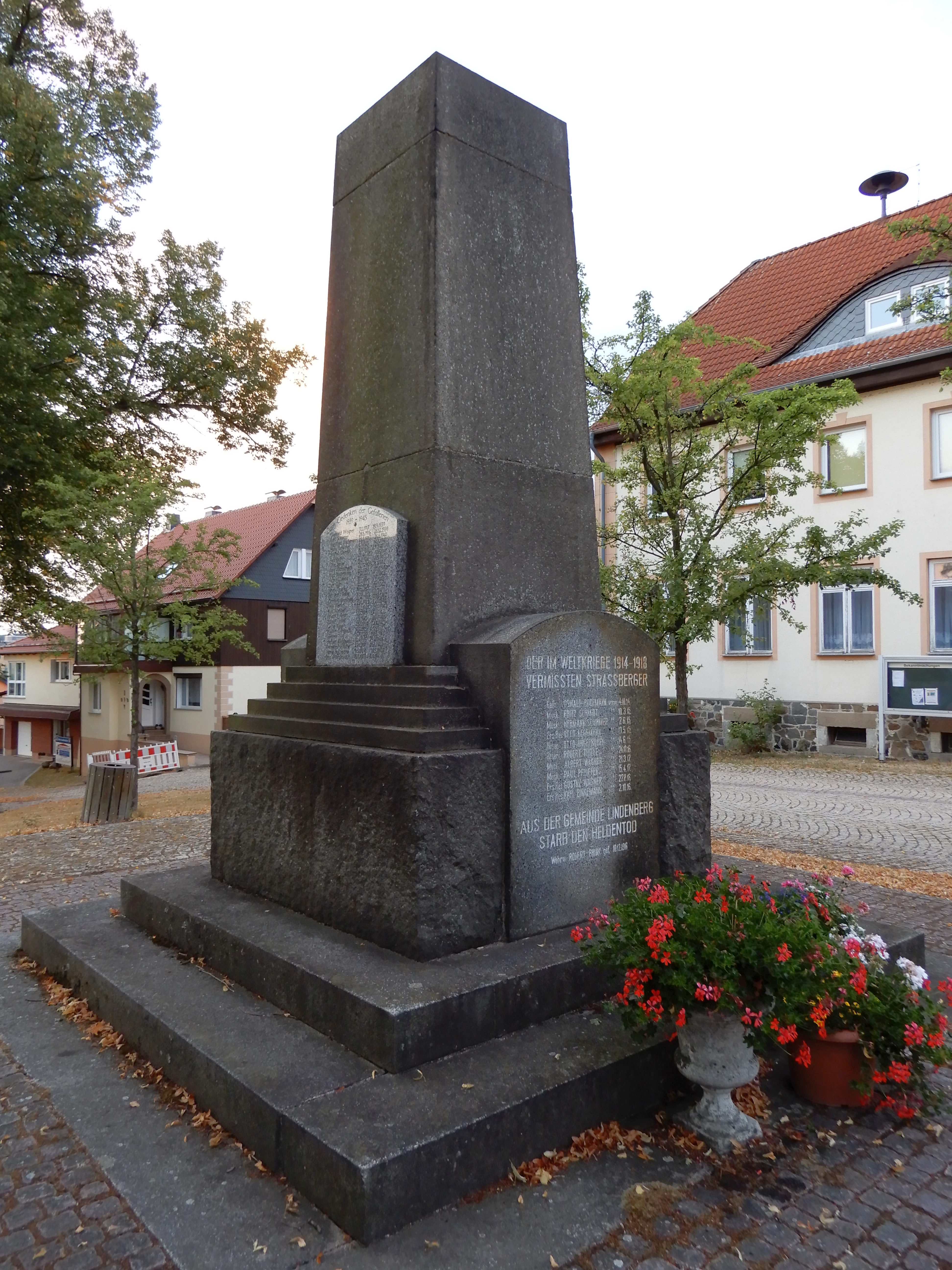 Kriegerdenkmal in Straßberg.